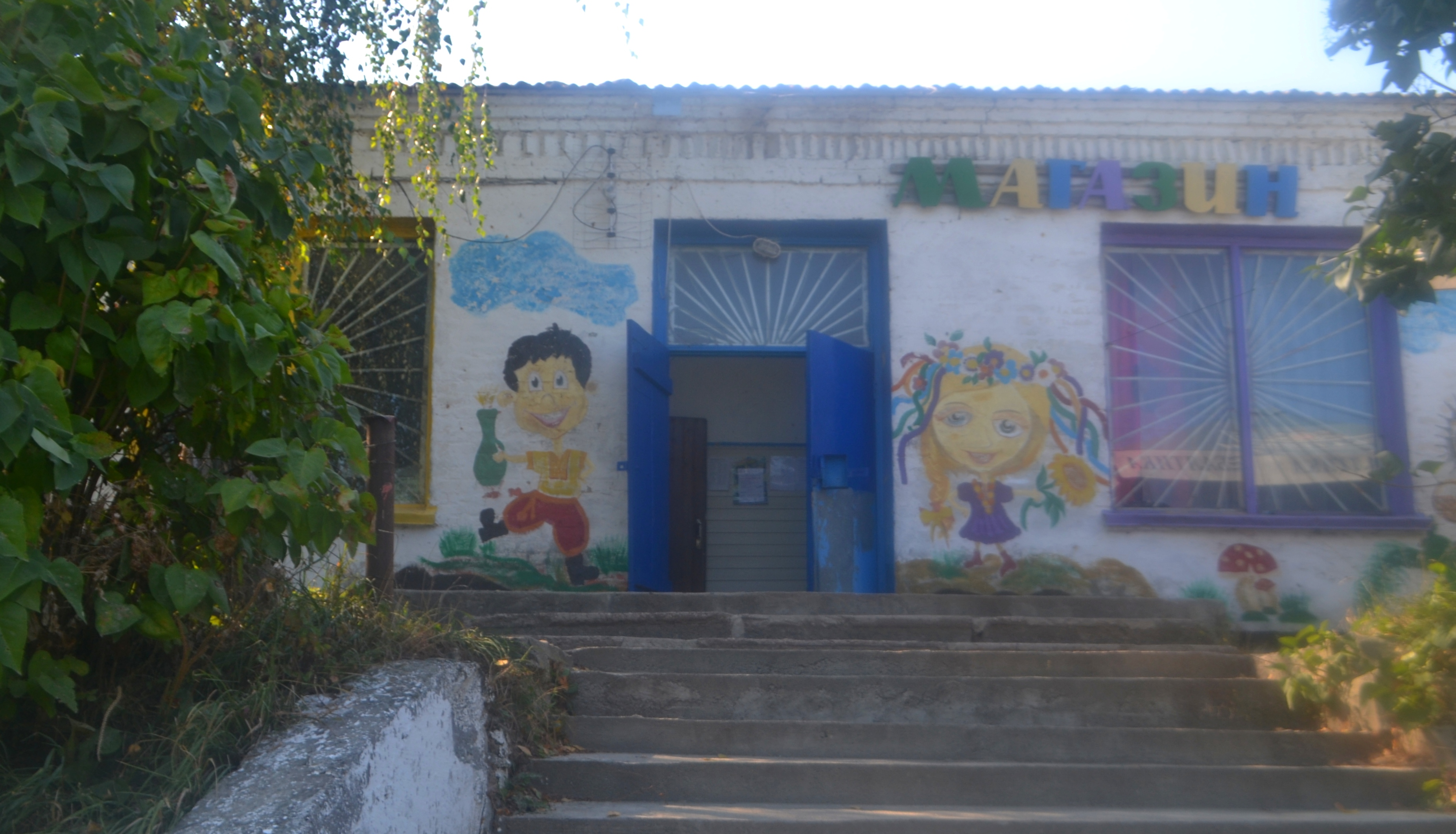 магазин в с.Григорівка (Канівський район)